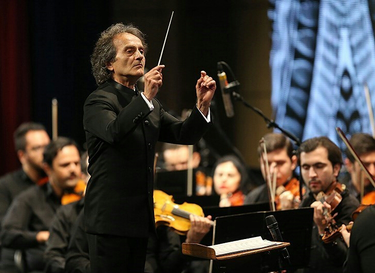 شهرداد روحانی در سی و یکمین جشنواره موسیقی فجر - ۱۳۹۵